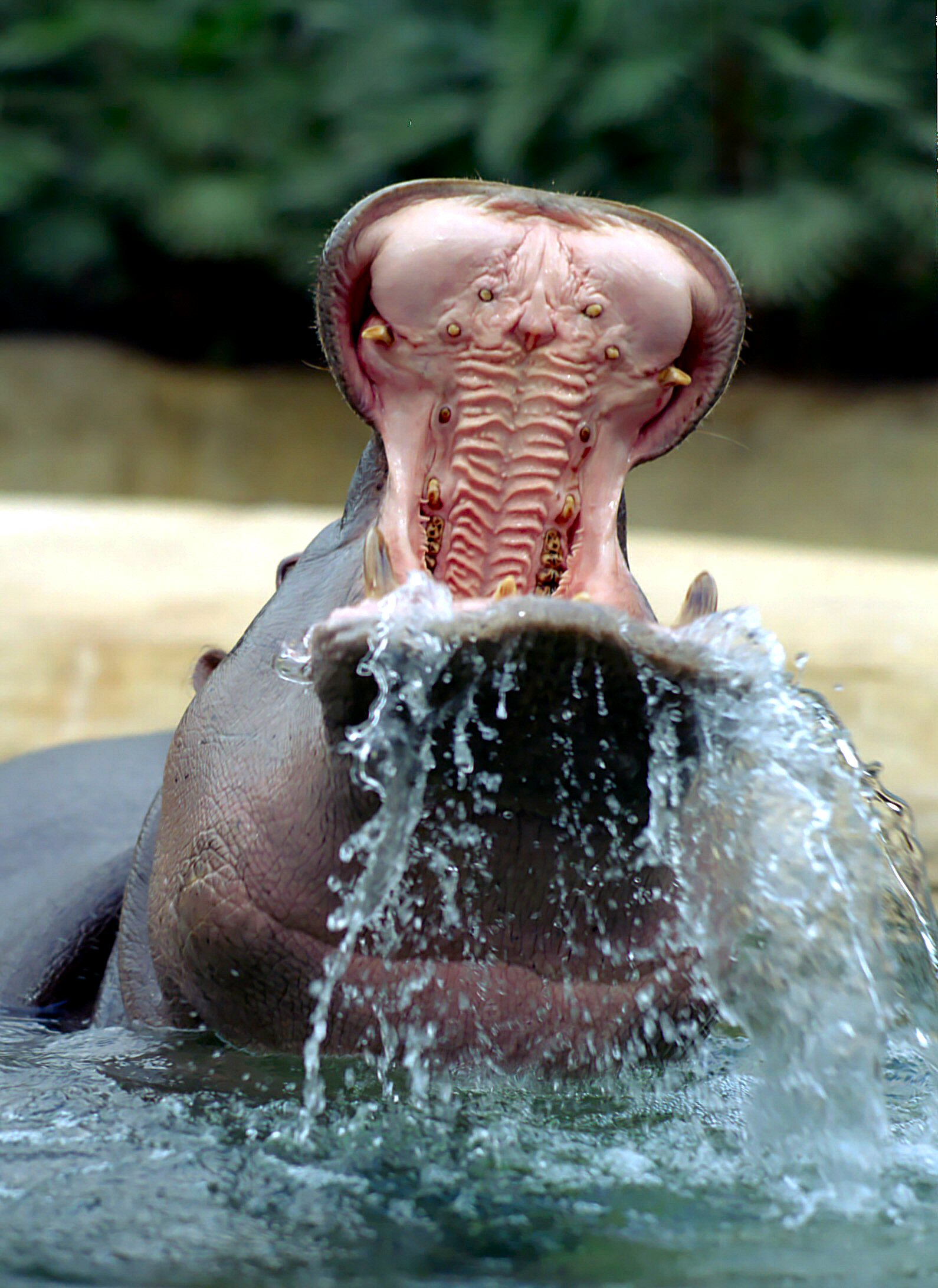 Original ist von Benutzer: Bautsch Modifikation: Jazz-face 21:05, 27. Jul 2006 (CEST)